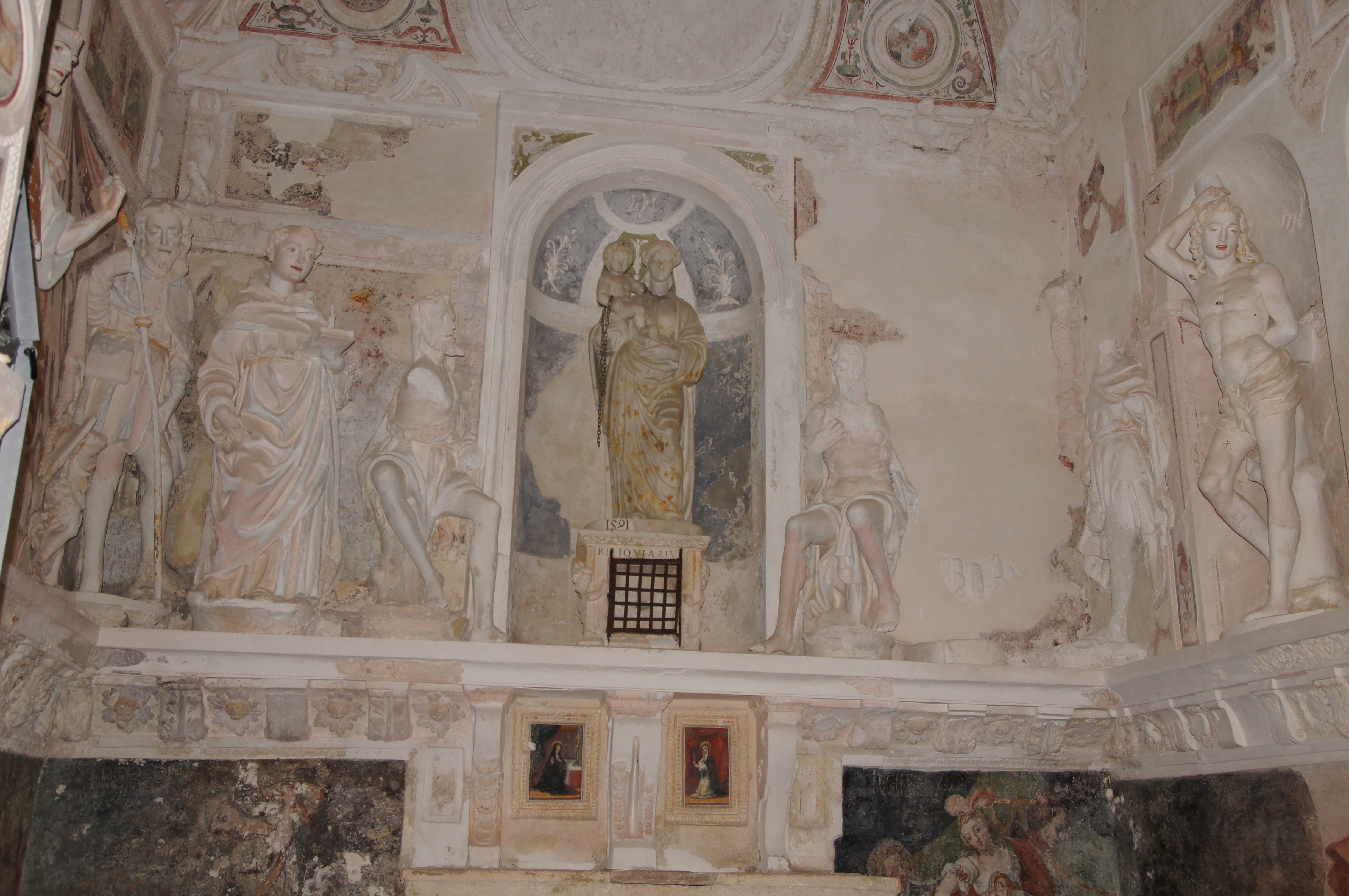 Caltabellotta